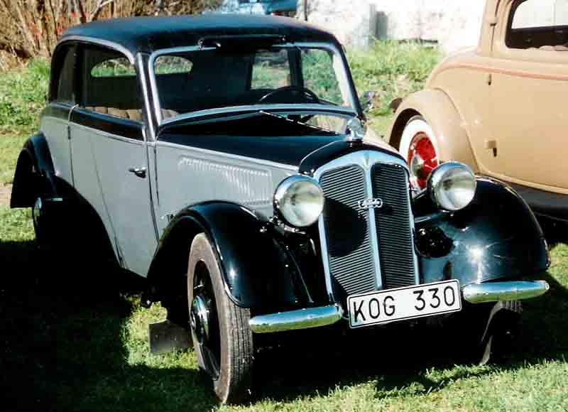 DKW Meisterklasse Type F7 – 700 Limousine 1938